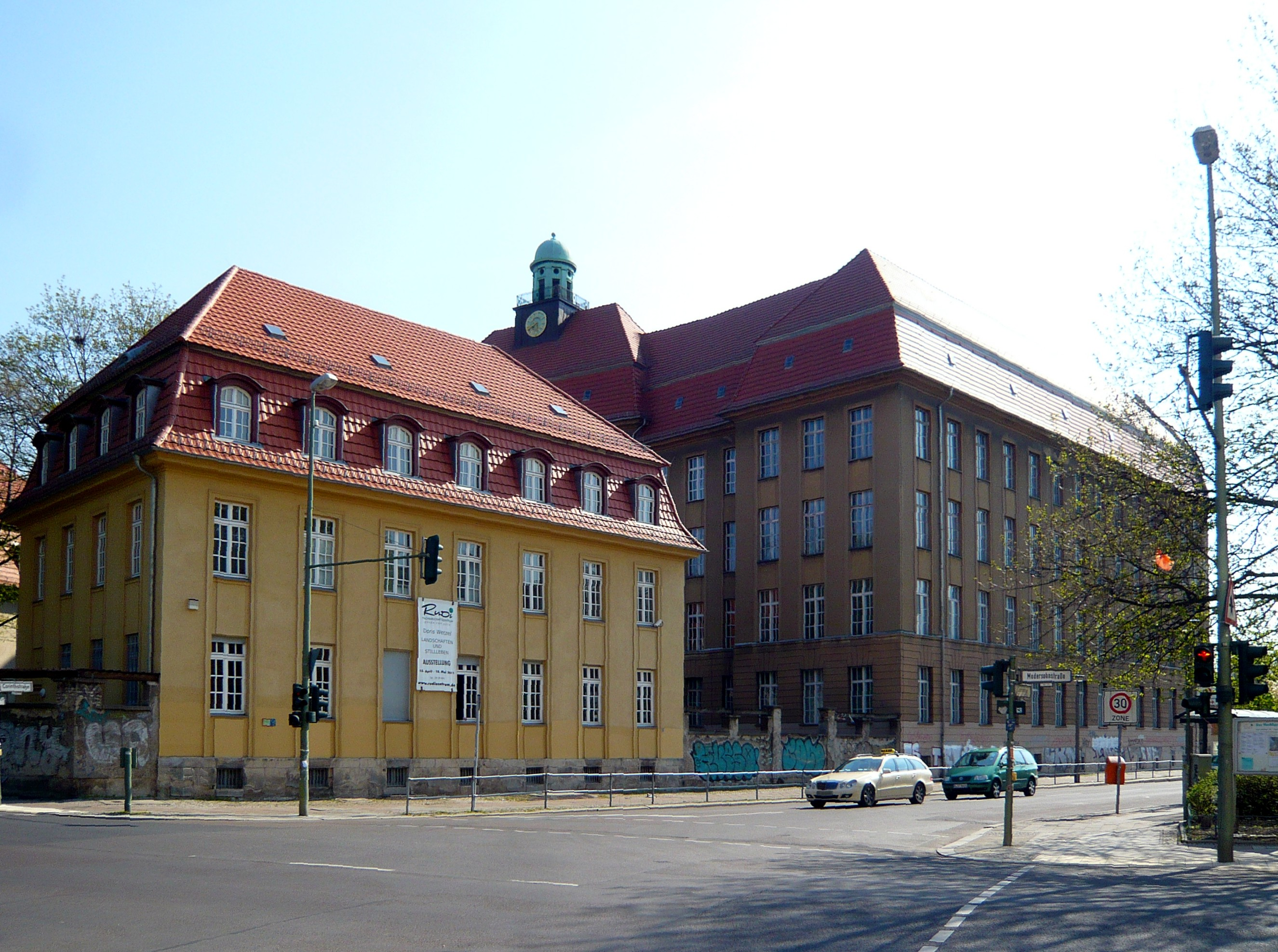 Ortsteil Berlin-Friedrichshain: Corinthstr., Schulkomplex Ecke Modersohnstraße